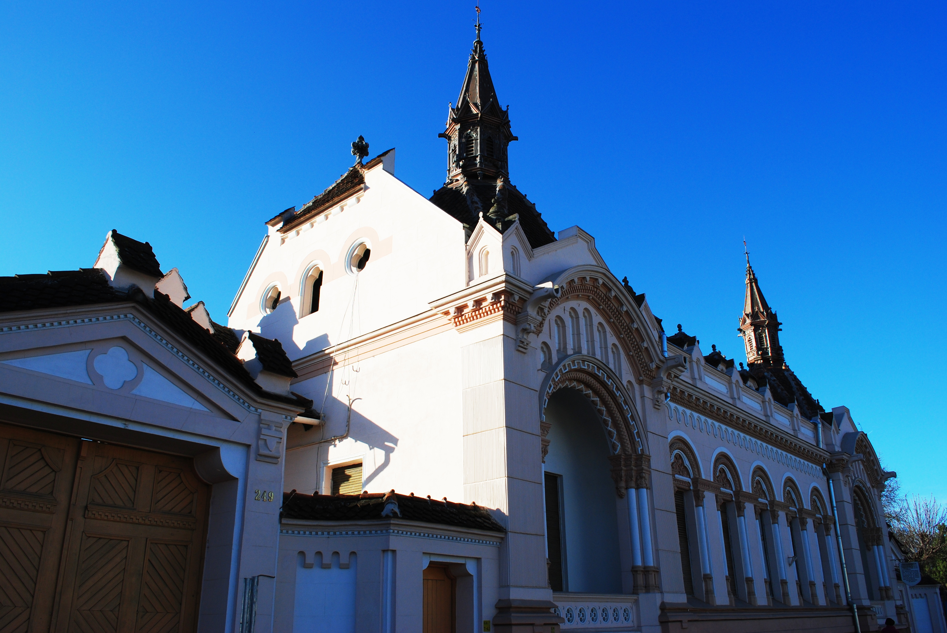 Casă parohială, 1905 04